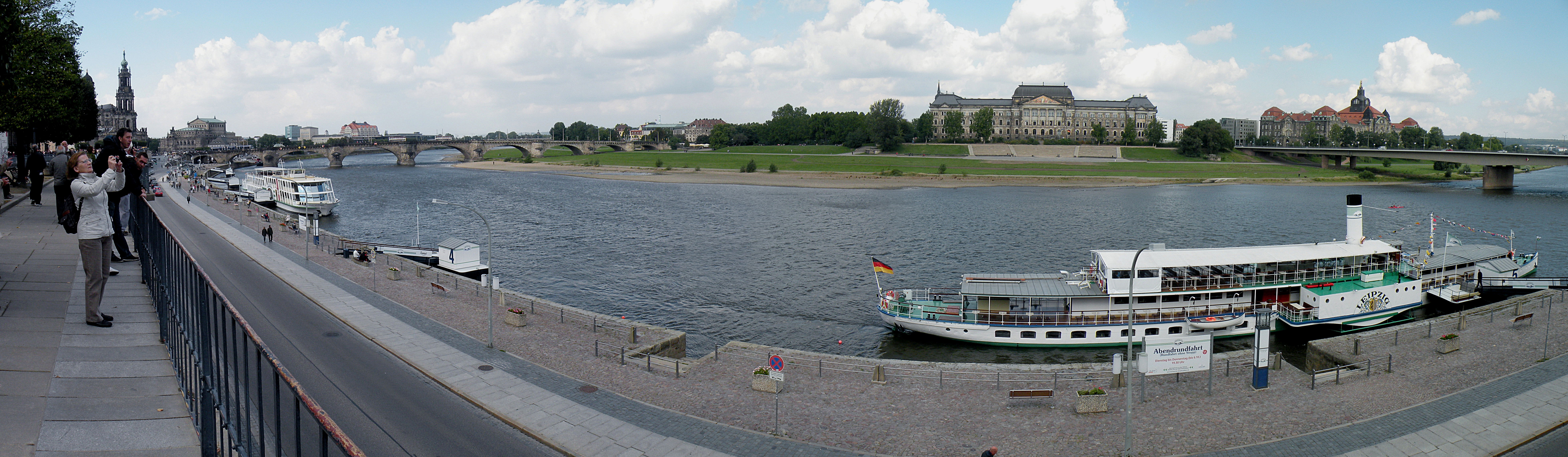 Elba_in_Dresden.